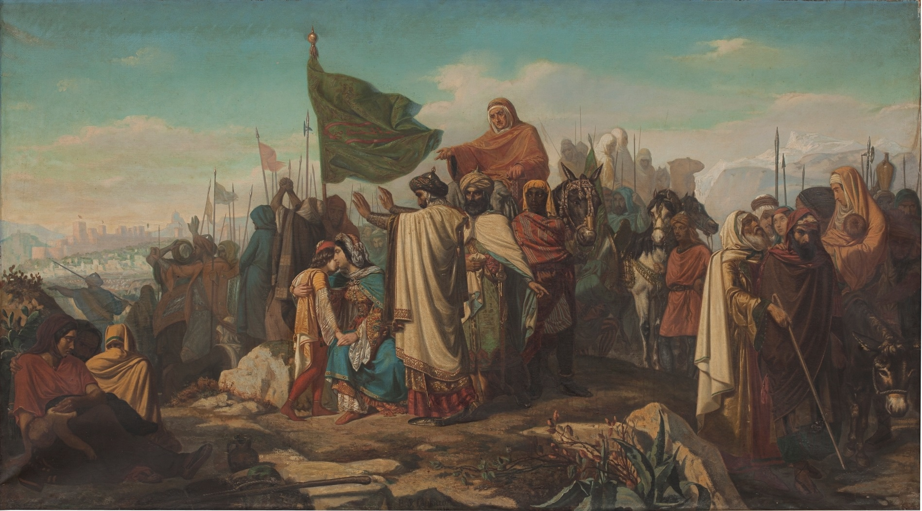 La obra representa al rey Boabdil (1459-1533), ultimo emir de Granada, suspirando en las cercanías de dicha ciudad después de que la misma y todo el reino de Granada hubieran ccaído en manos de los Reyes Católicos en 1492.